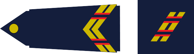 Galons d'élève maistrancier de la Marine nationale française